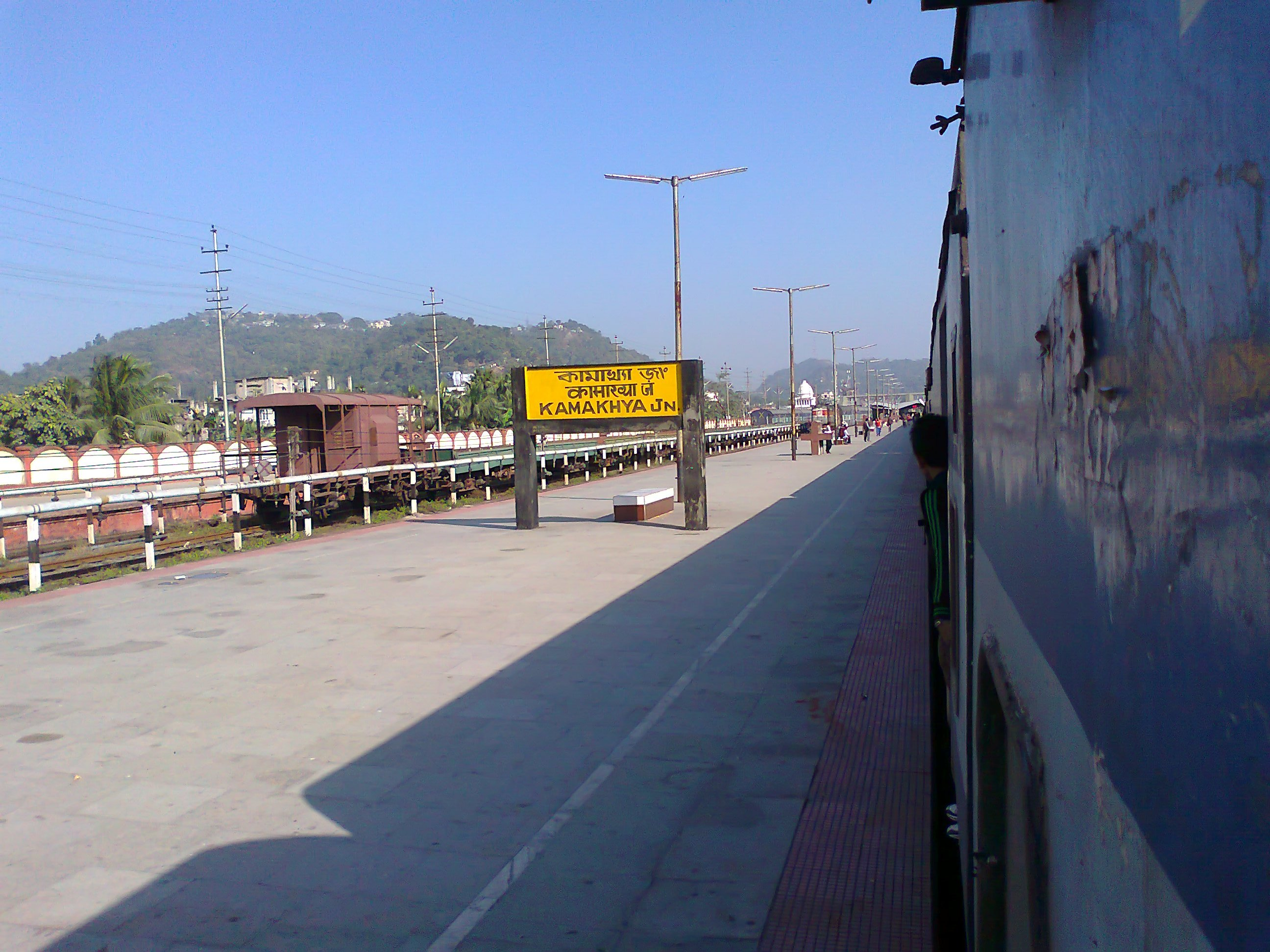 Kamakhya Junction, Guwahati, Assam